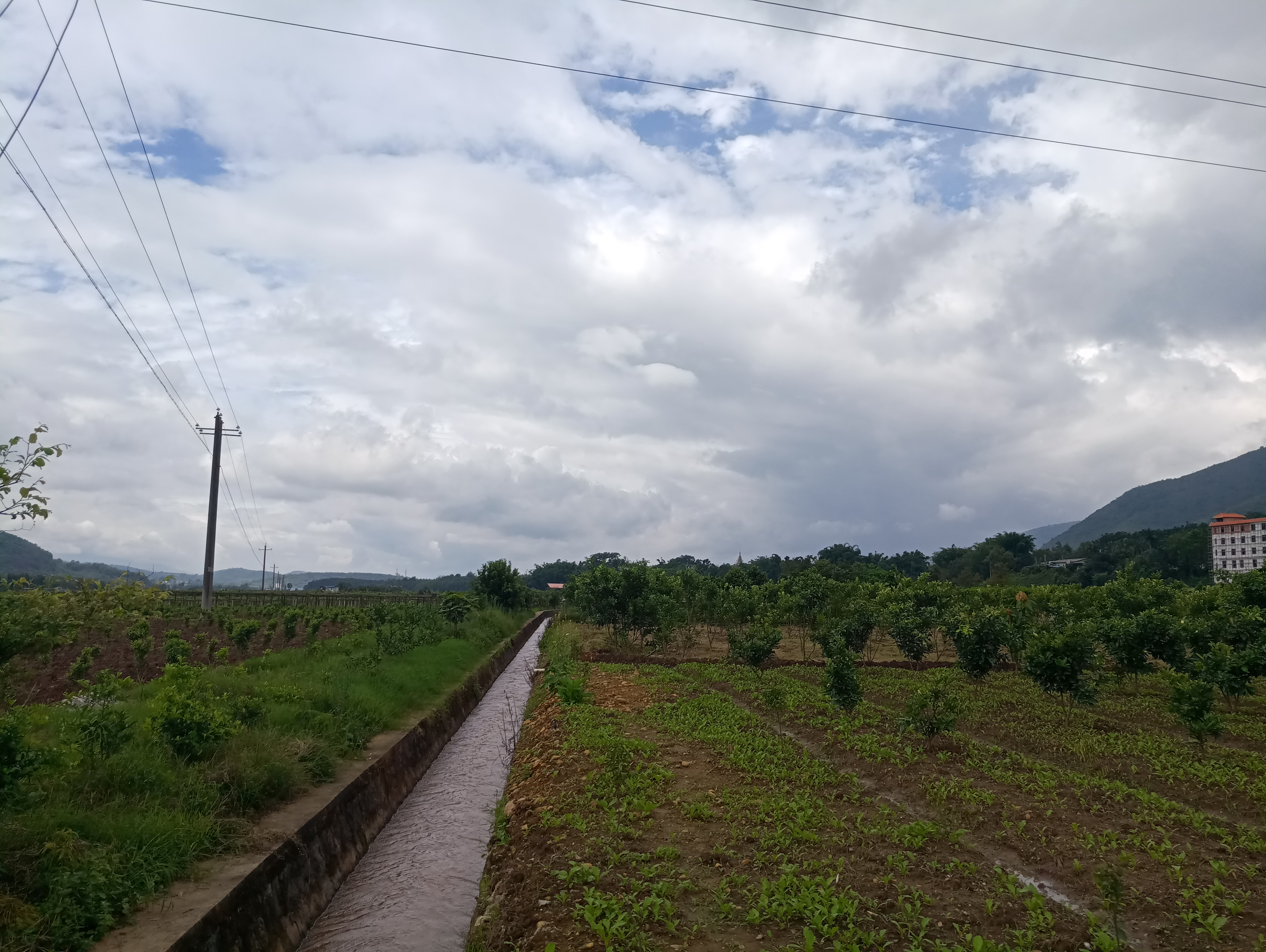 中文（中国大陆）: 畹町农场，种植着柚子